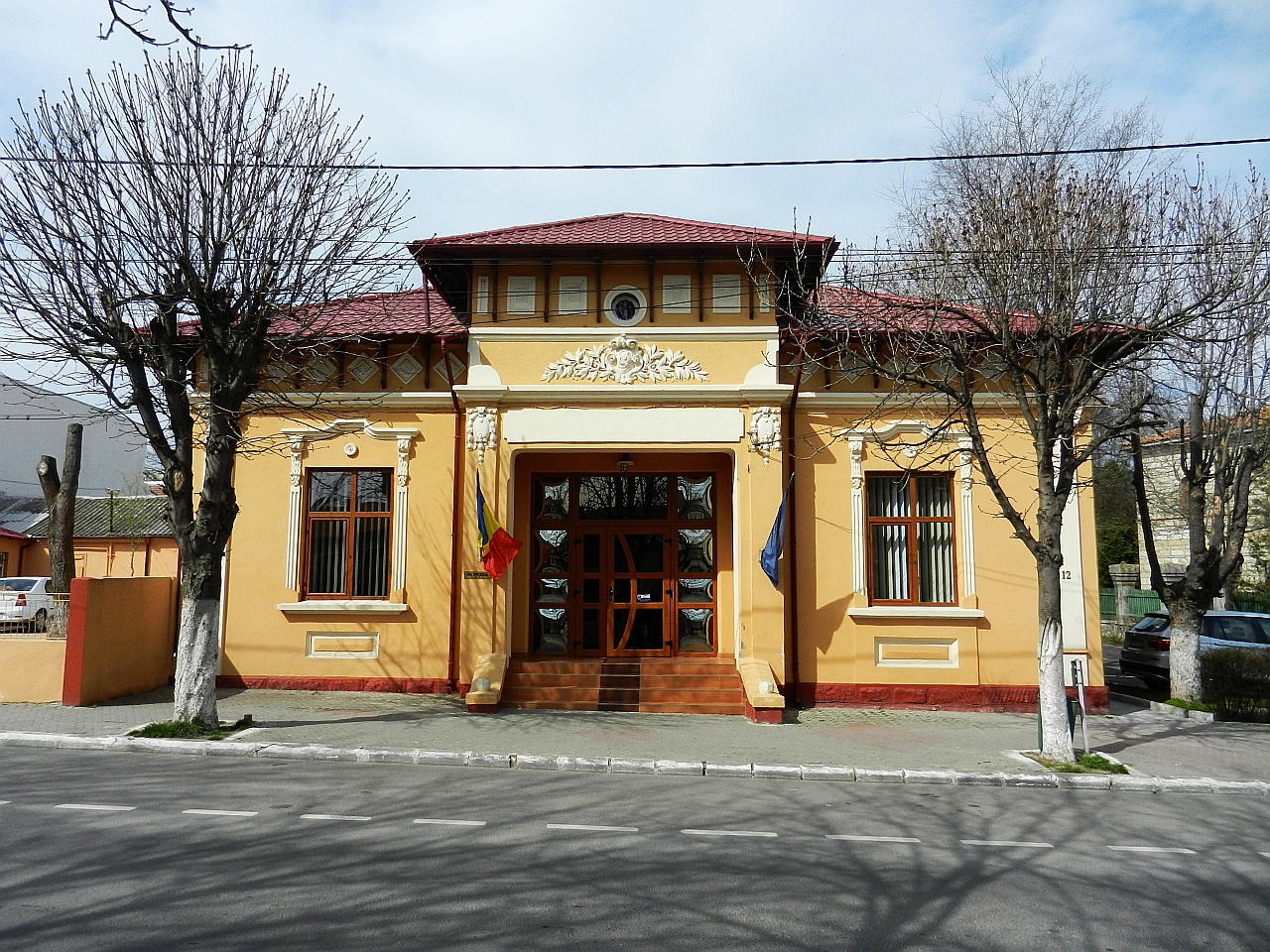 Casa de la nr. 22